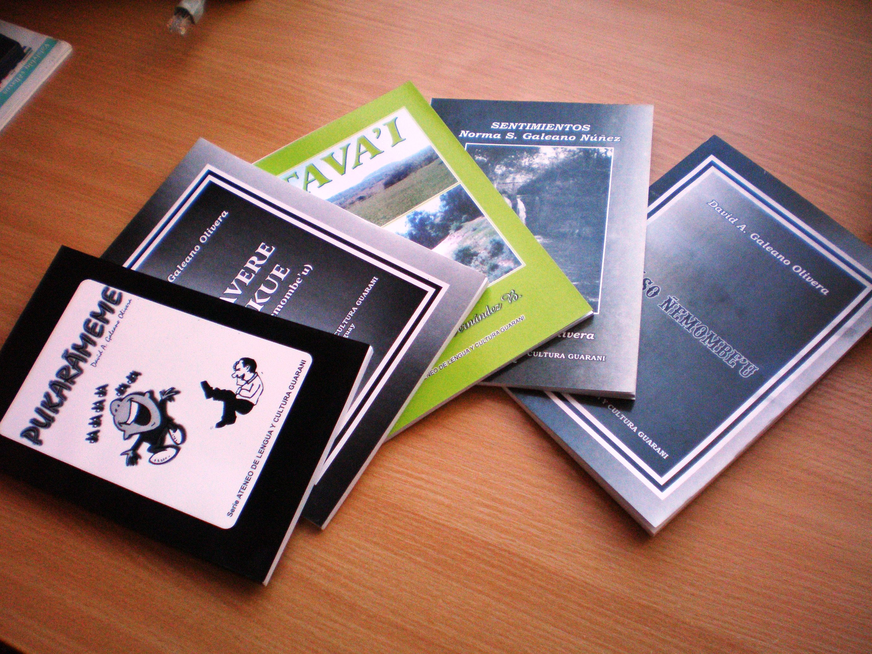 Libros en idioma guarani por Ateneo de Lengua y Cultura Guarani